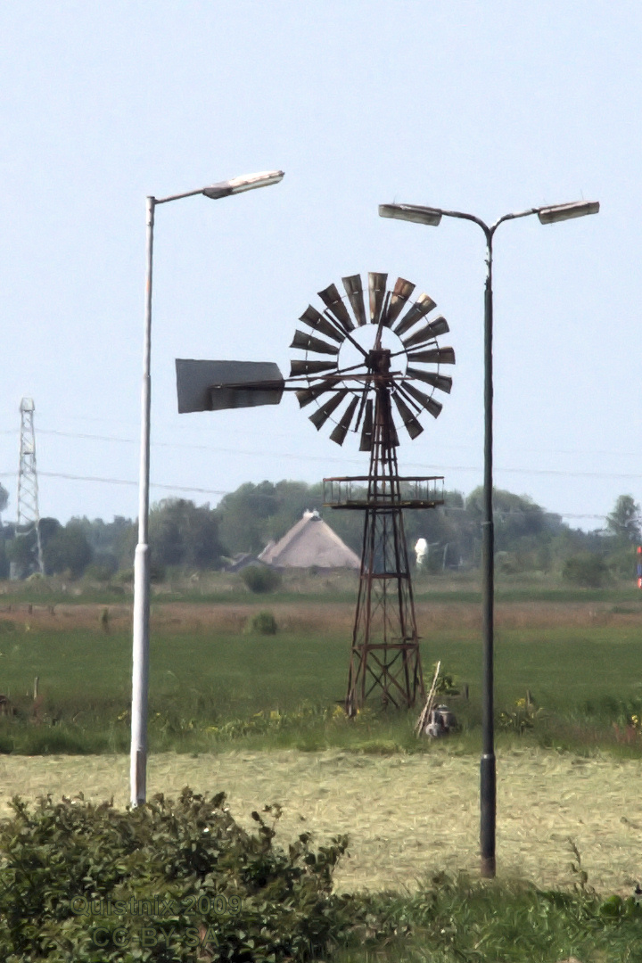 Garijp: Windmotor, naast de ijsbaan.